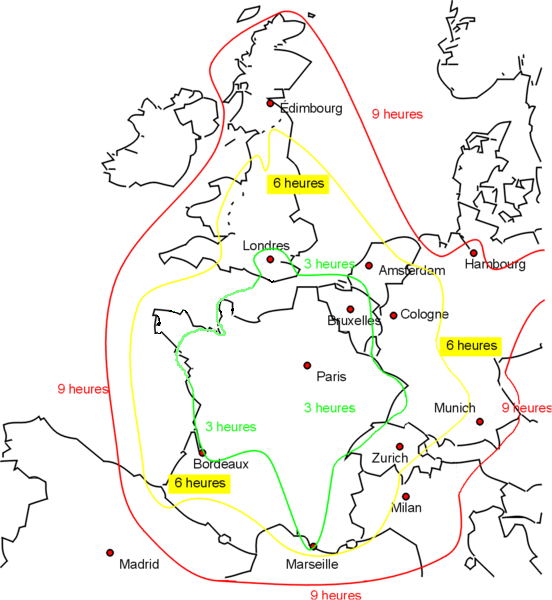 Duree de voyage de Paris avec le train.